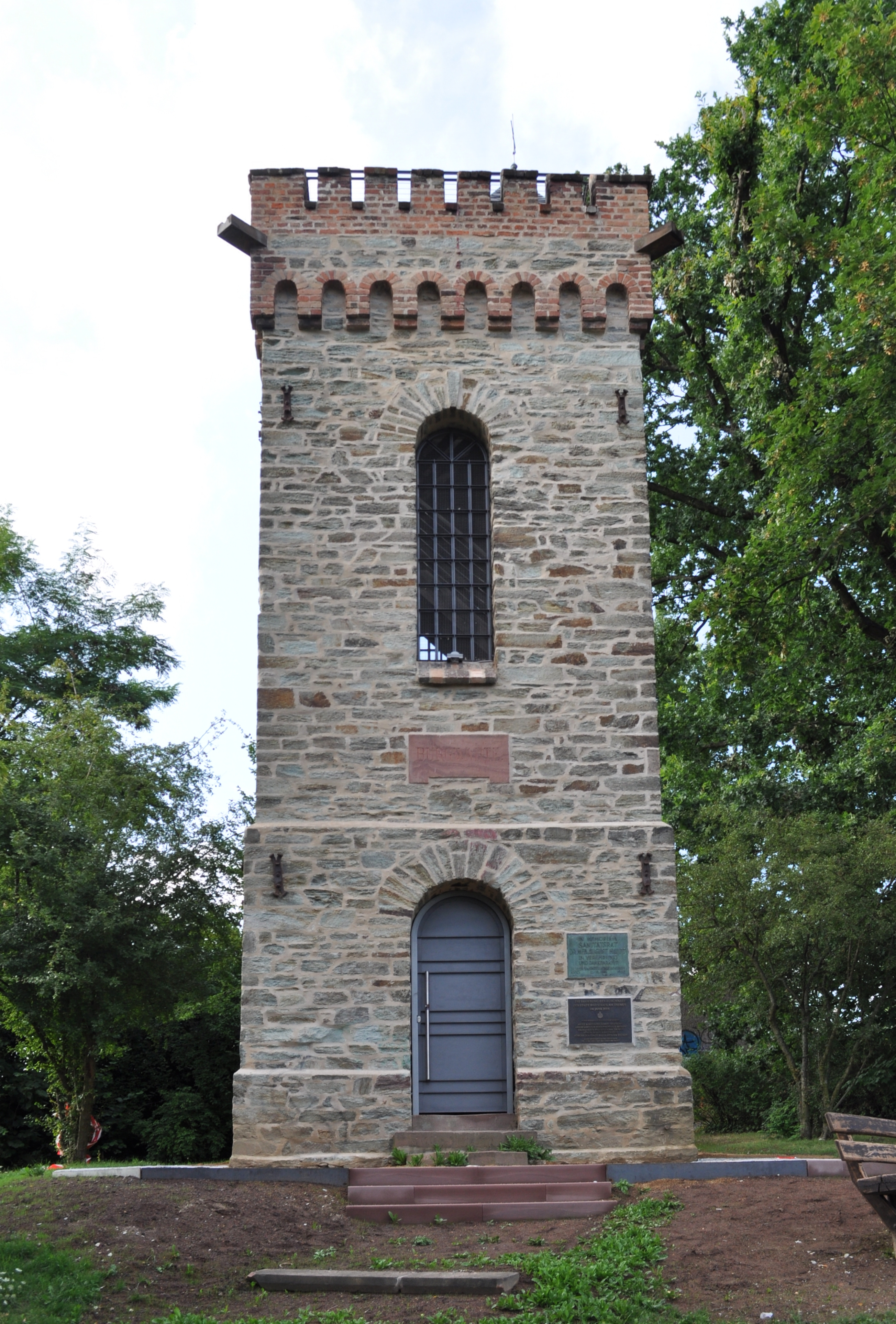 Burgbergturm in Bad Soden, Ansicht von unten